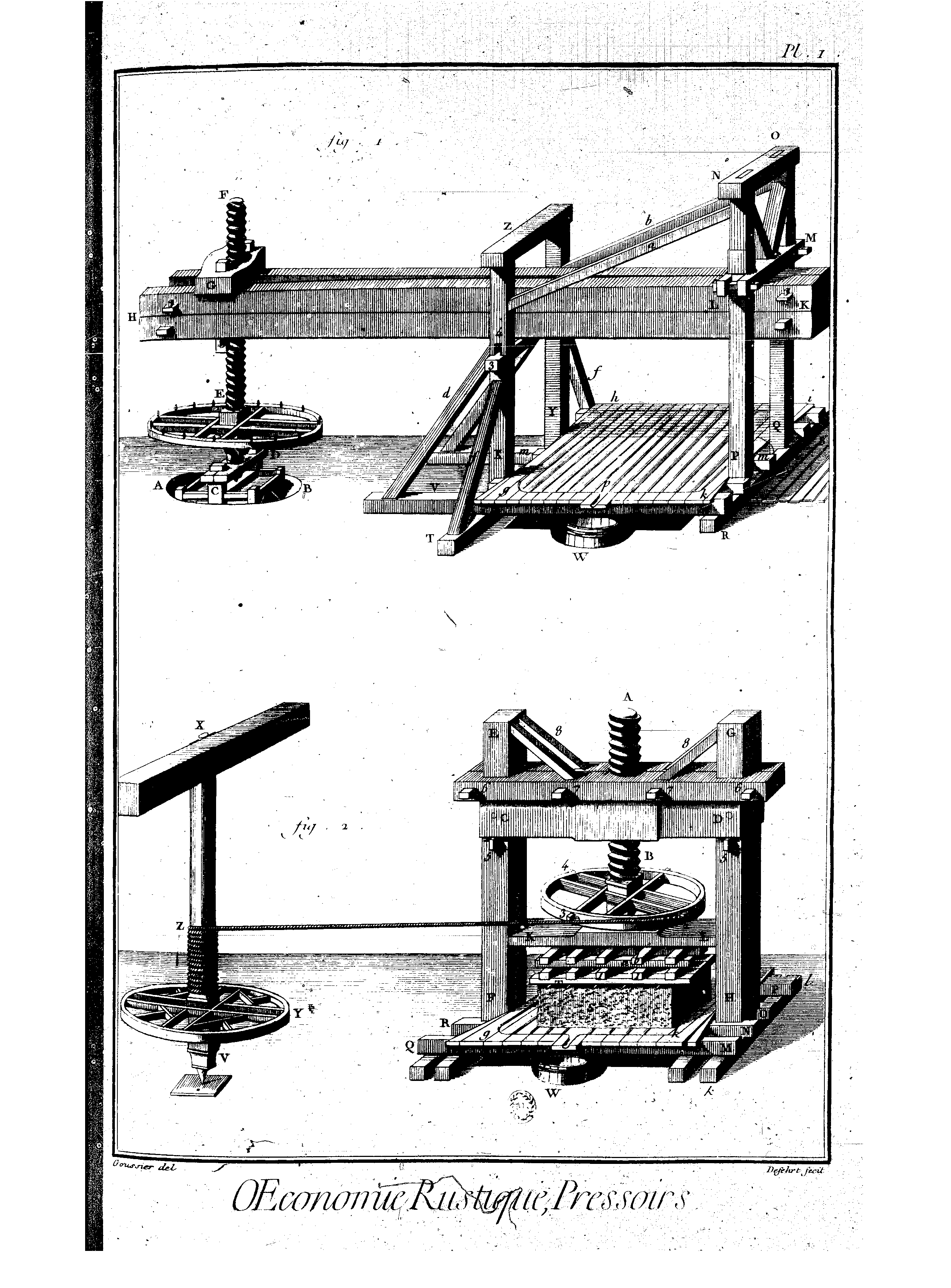 Planches de l'Encyclopédie de Diderot et d'Alembert, volume 1.